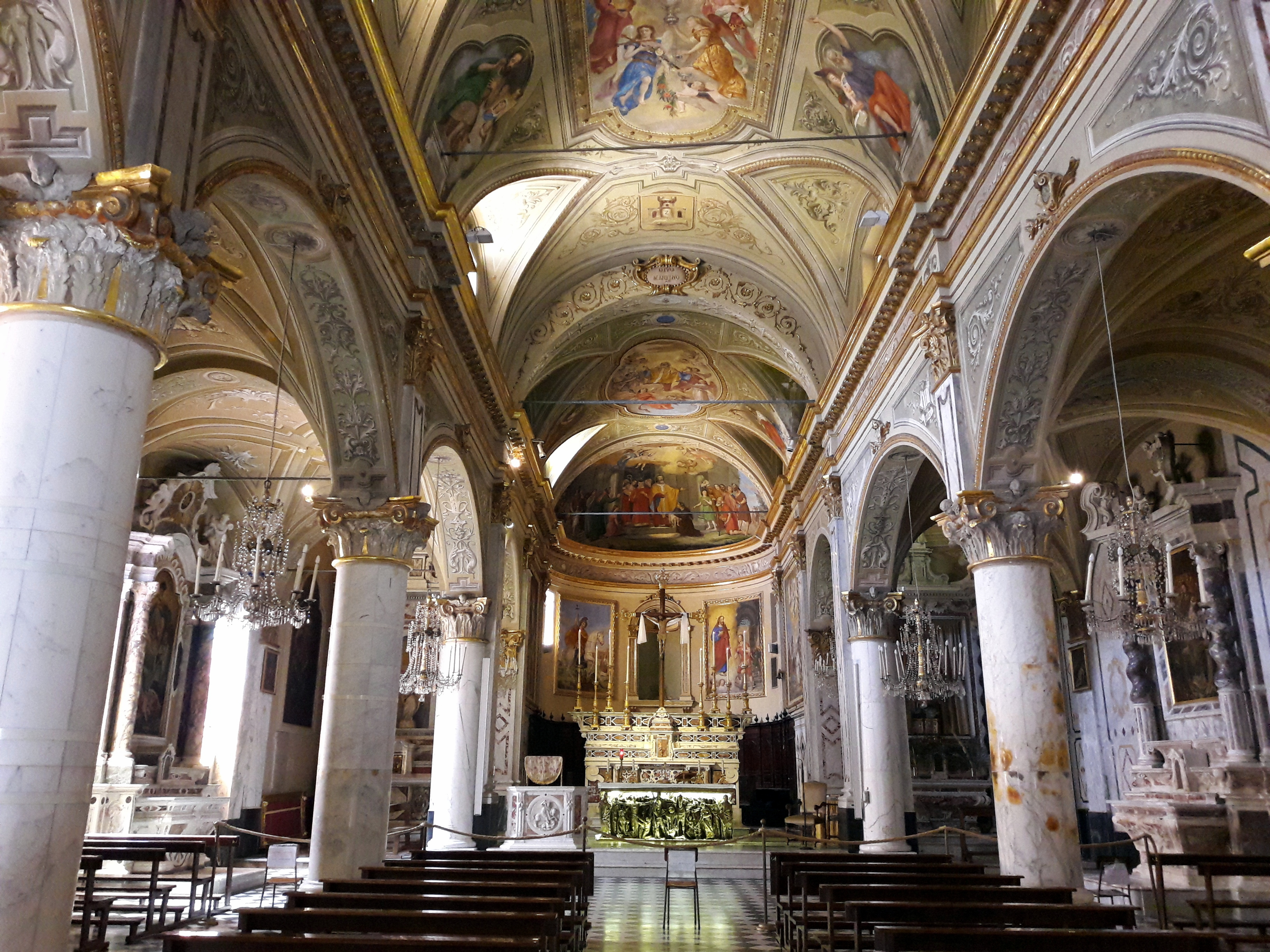 La chiesa di San Martino, Portofino, Liguria, Italy